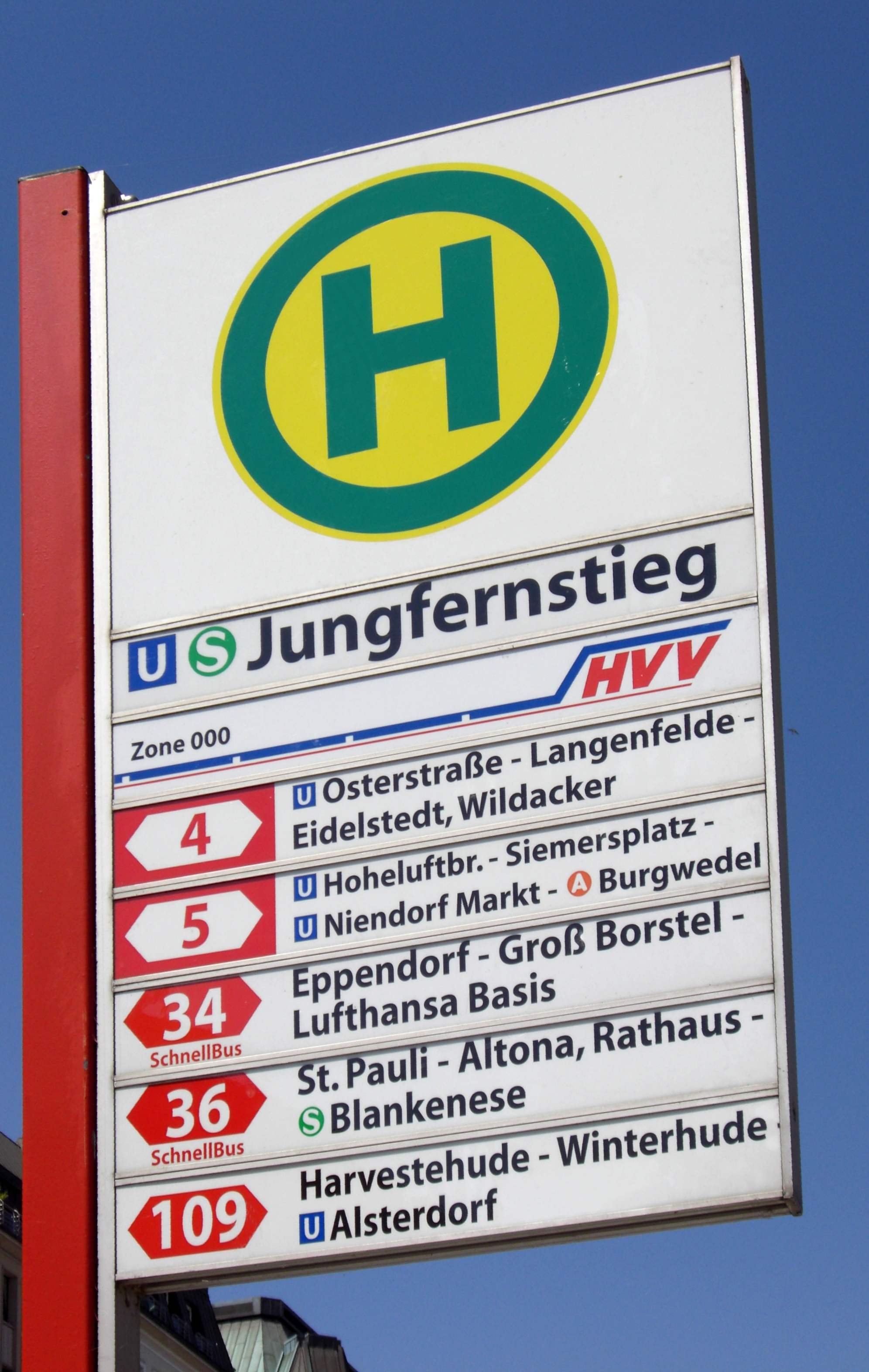 Bushaltestellenschild an der Station Jungfernstieg in Hamburg.